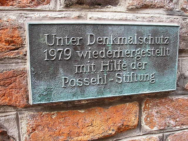 Schild mit Hinweis auf Possel-Stiftung an Lübecker Haus